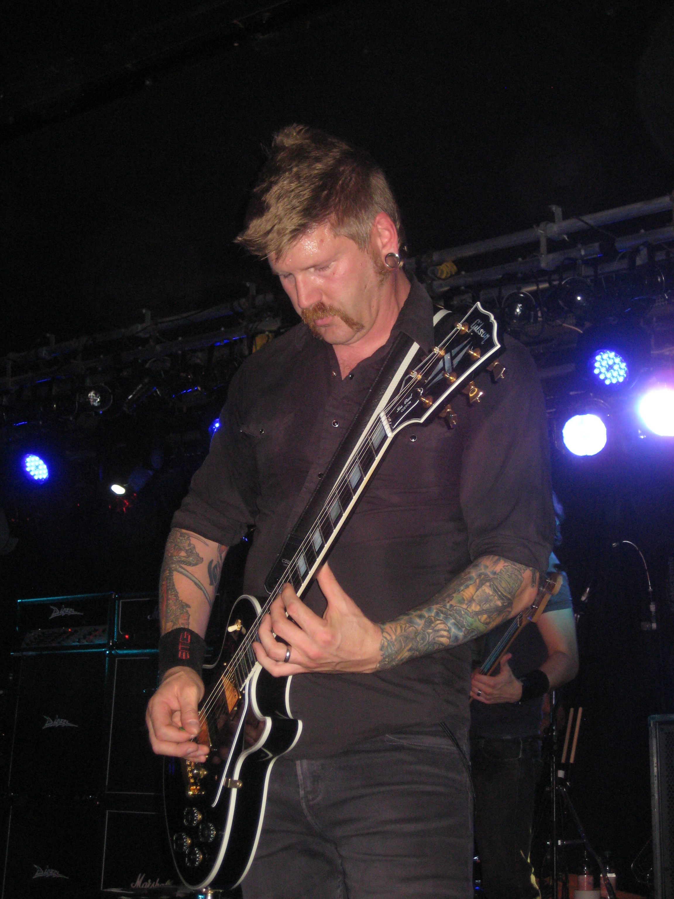 Bill Kelliher from Mastodon live @ Colos-Saal Aschaffenburg, Germany